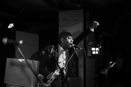 Algiers Live London 2015